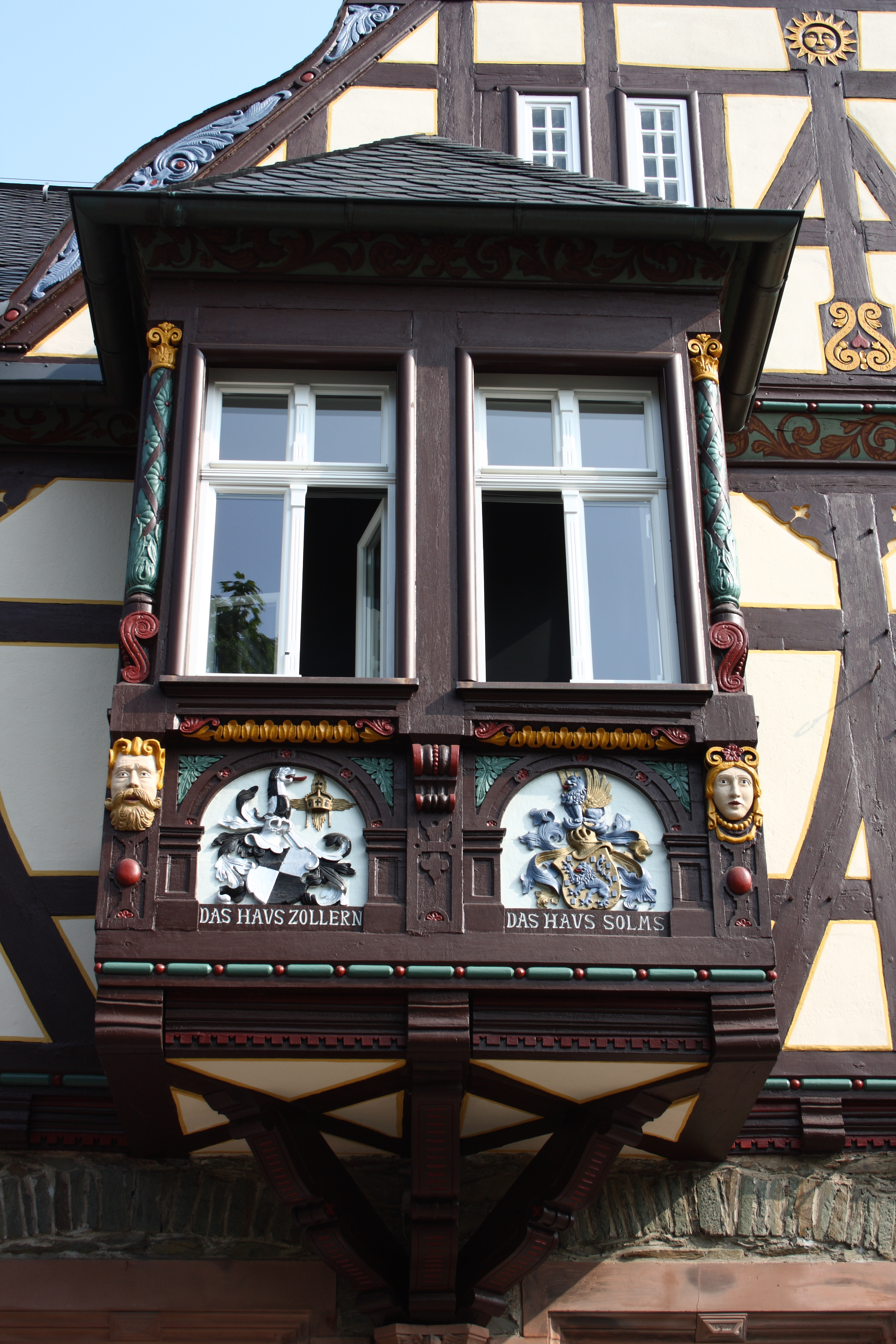 ehemaliges Postamt in Braunfels im Lahn-Dill-Kreis (Hessen), Am Kurpark 11